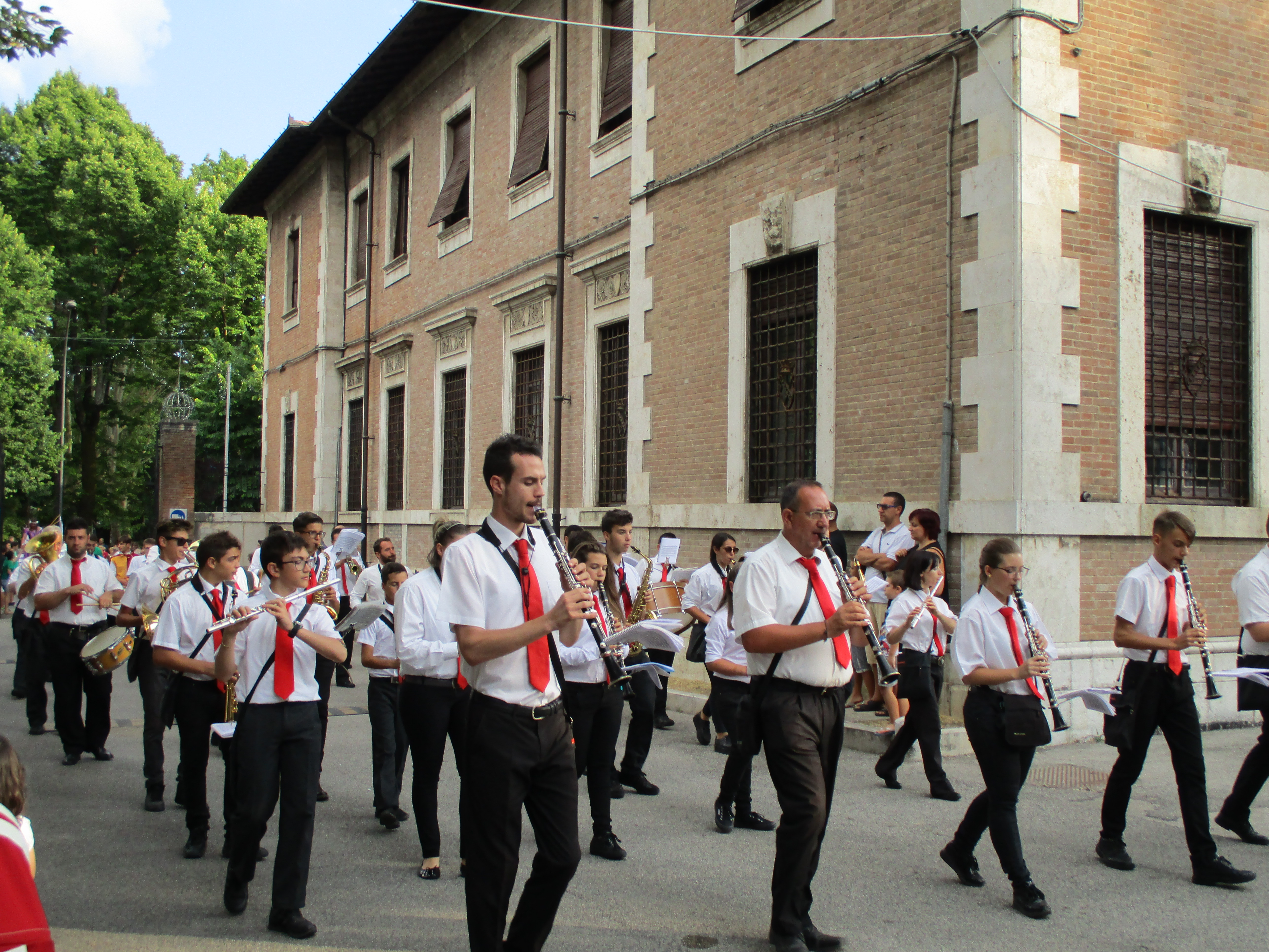 Sfilata delle bande musicali